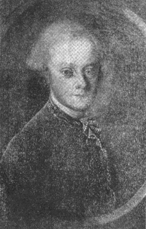 Karel Josef Salm 1769-1811